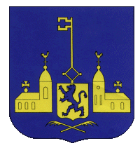 Oude wapen van Vught, verkregen van de gemeente Vught